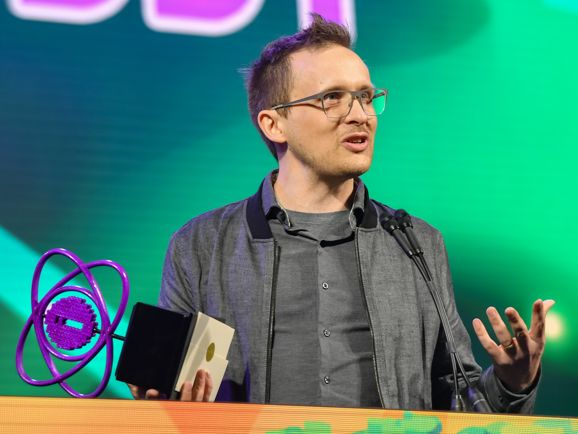 D5X_8214